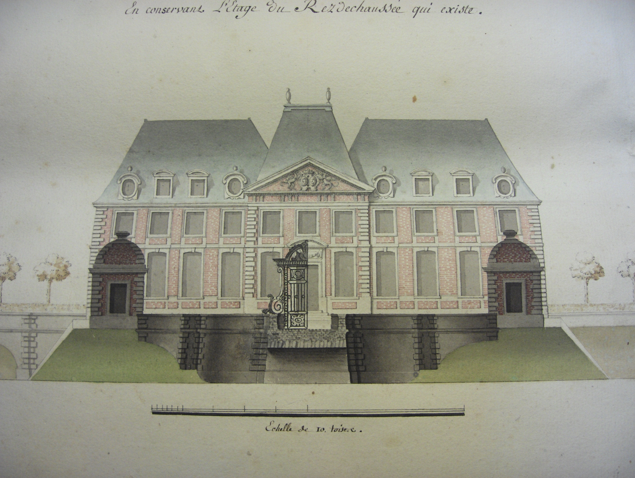 Le château dont il ne restait que le rez-de chaussée sera surélevé d'un étage. 02240 Renansart, Aisne, Picardie (France).